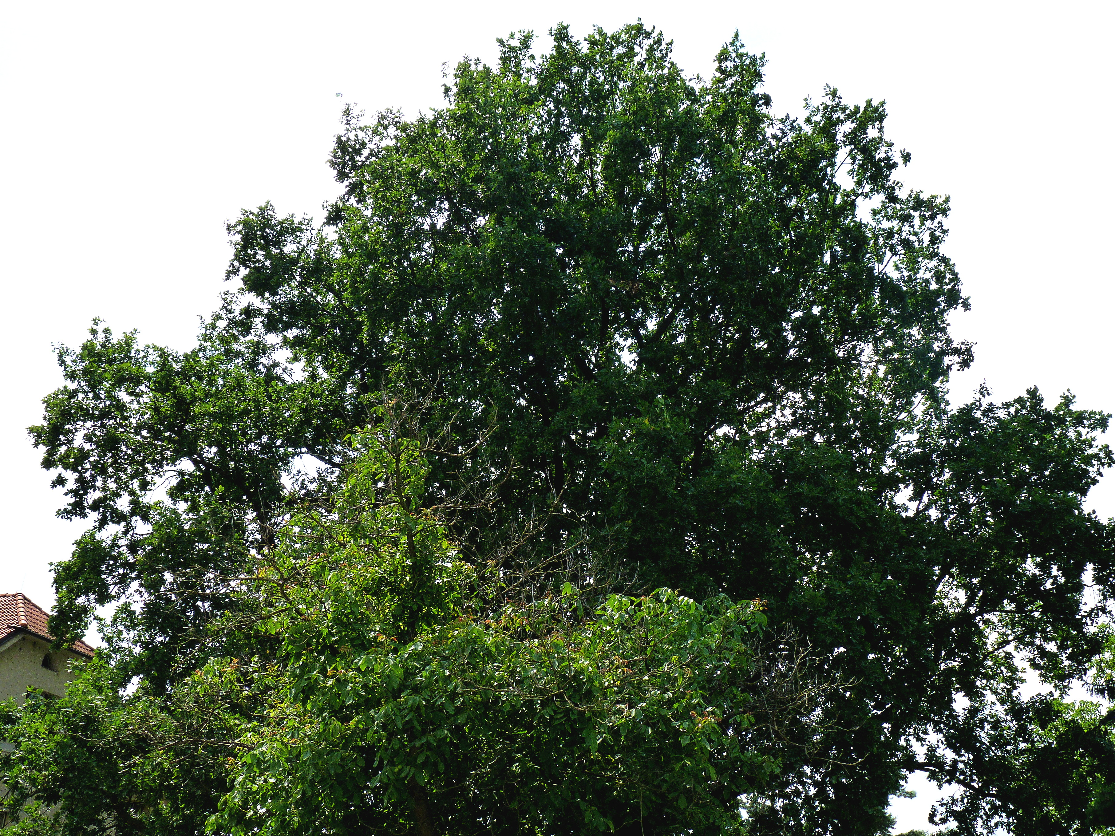 Dub letní, Dolní Počernice, ul. Národních hrdinů (2013).